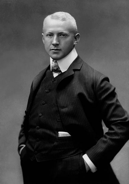 Der Schauspieler Hans Wassmann. Photographie von Wilhelm Höffert, c. 1900